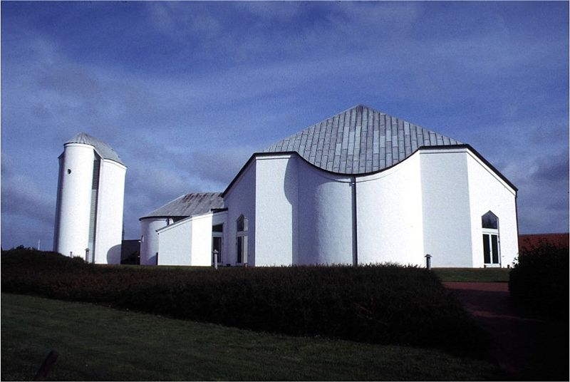 Hjerting Kirke i Danmark. Kirken set fra øst